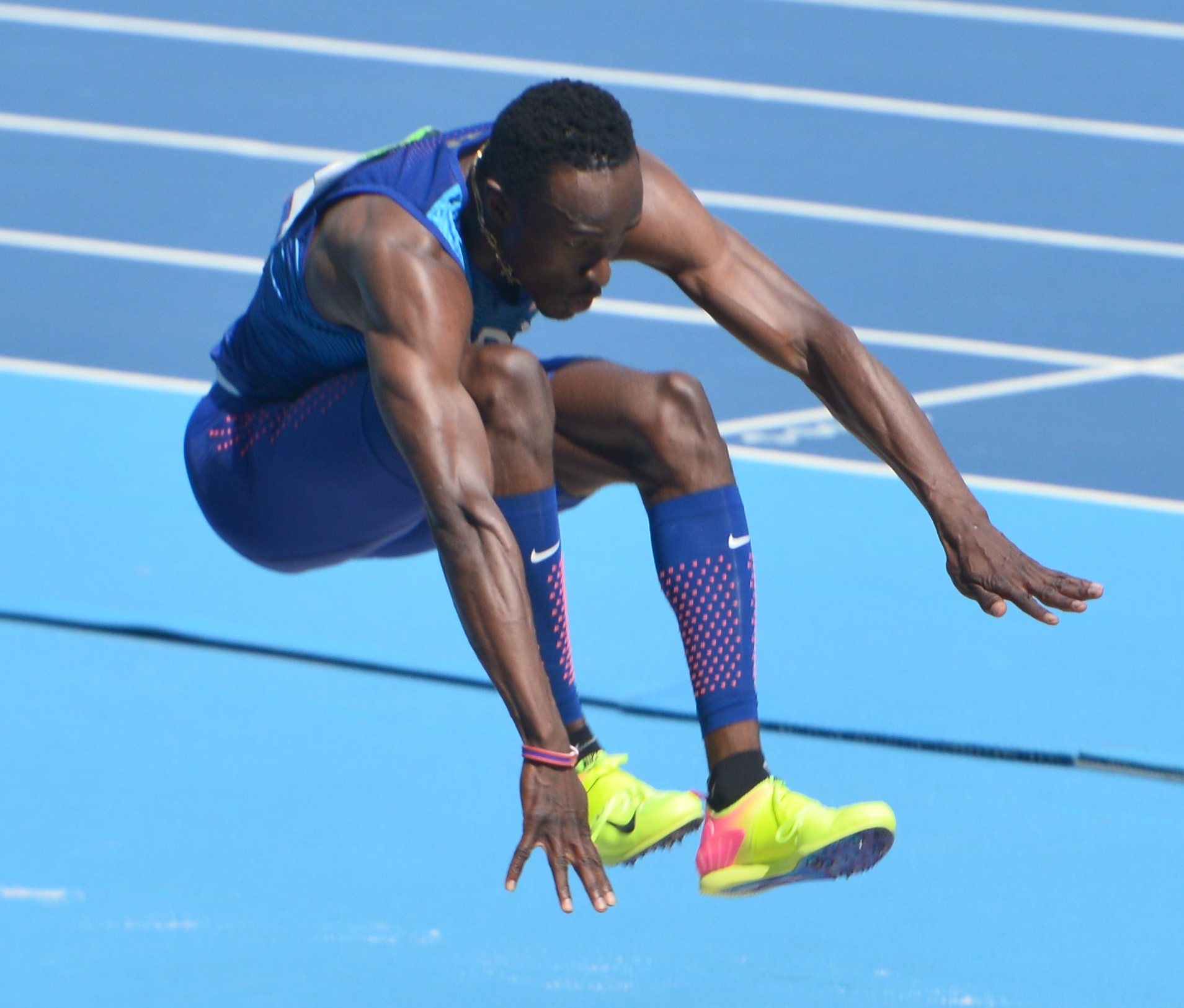 Will Claye médaillé d'argent au triple saut aux jo de Rio 2016